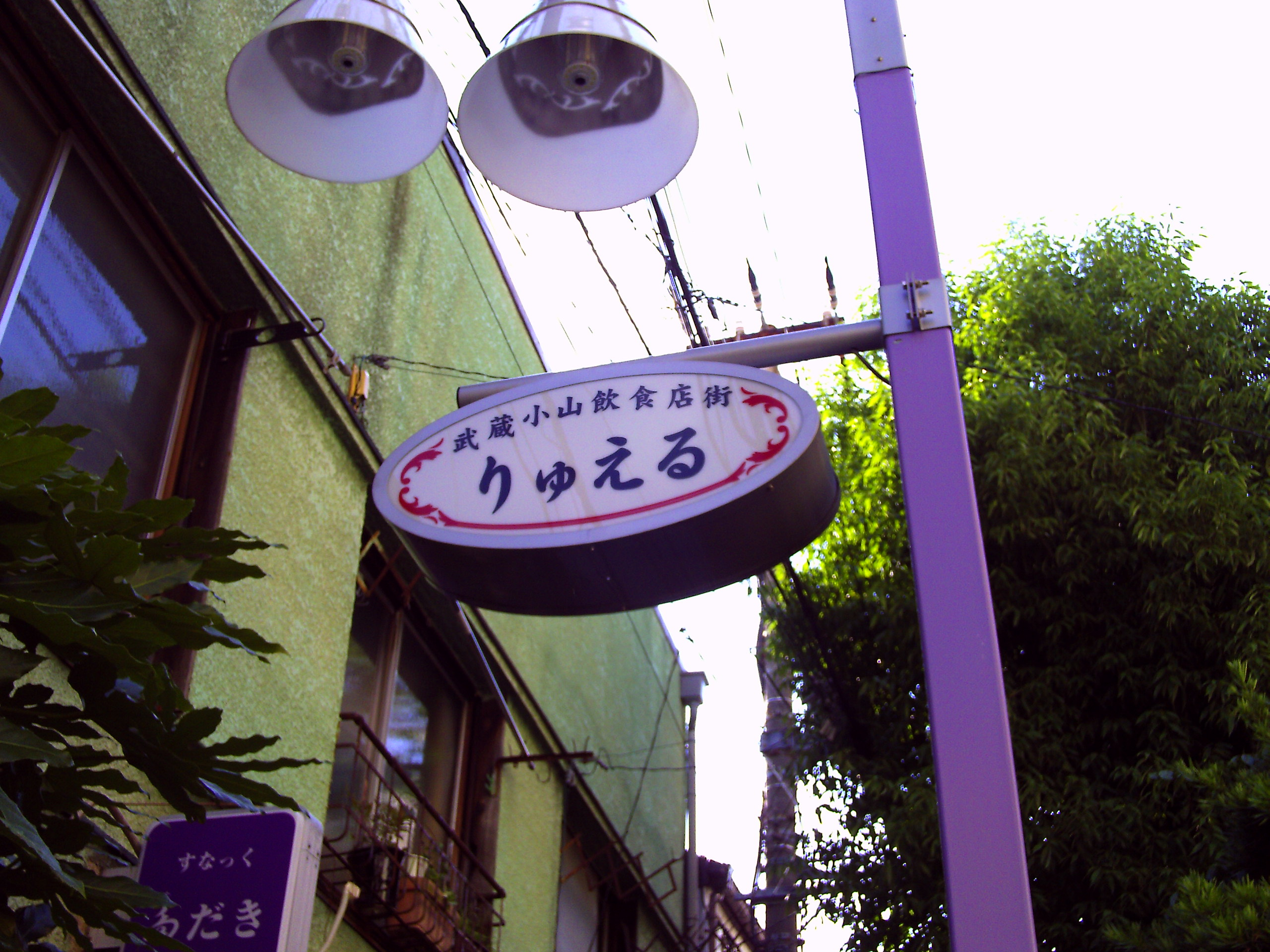 東京のしゃれた街並みづくり推進条例実施１号となる武蔵小山のりゅえる（看板）